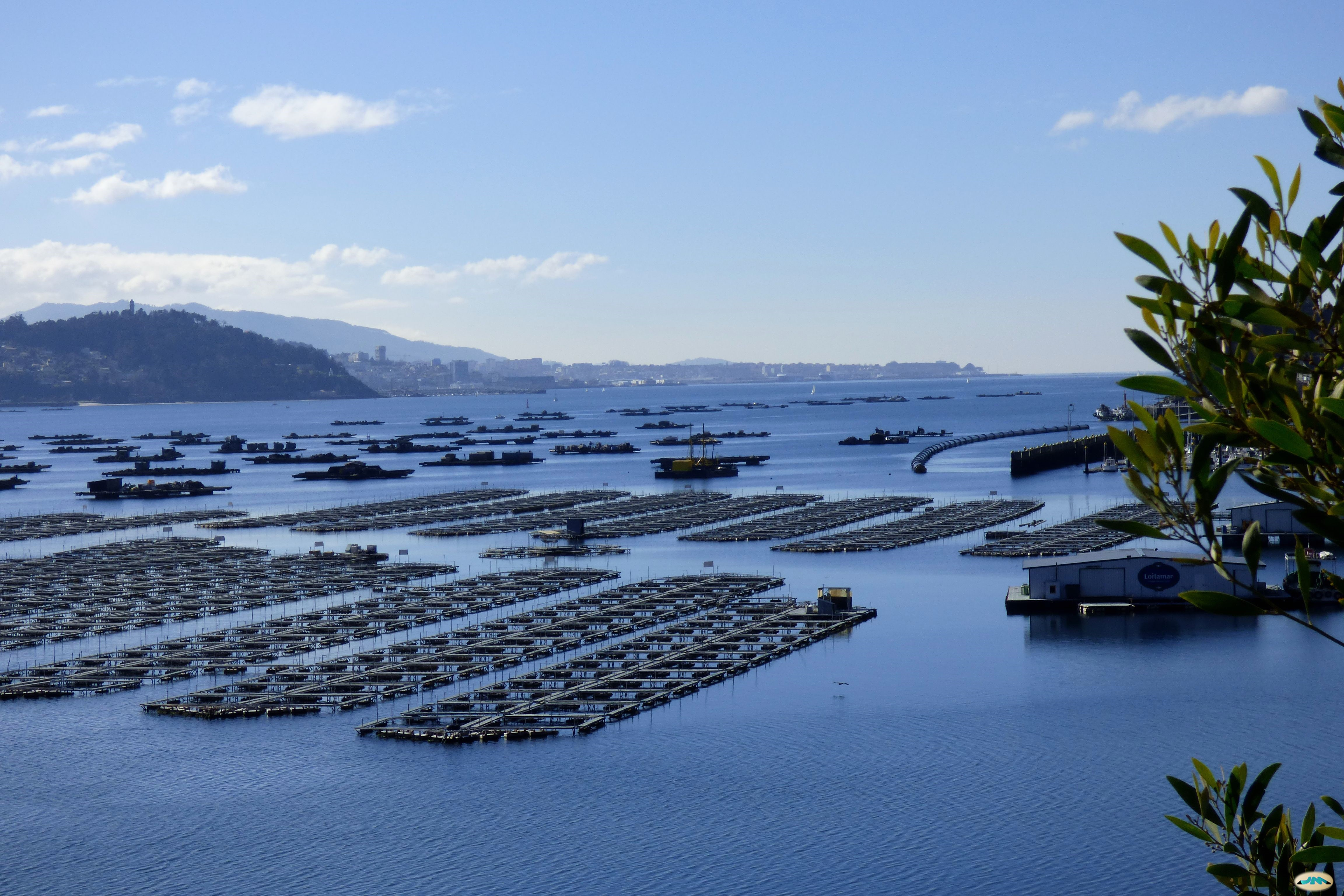 Ría de Vigo desde Domaio